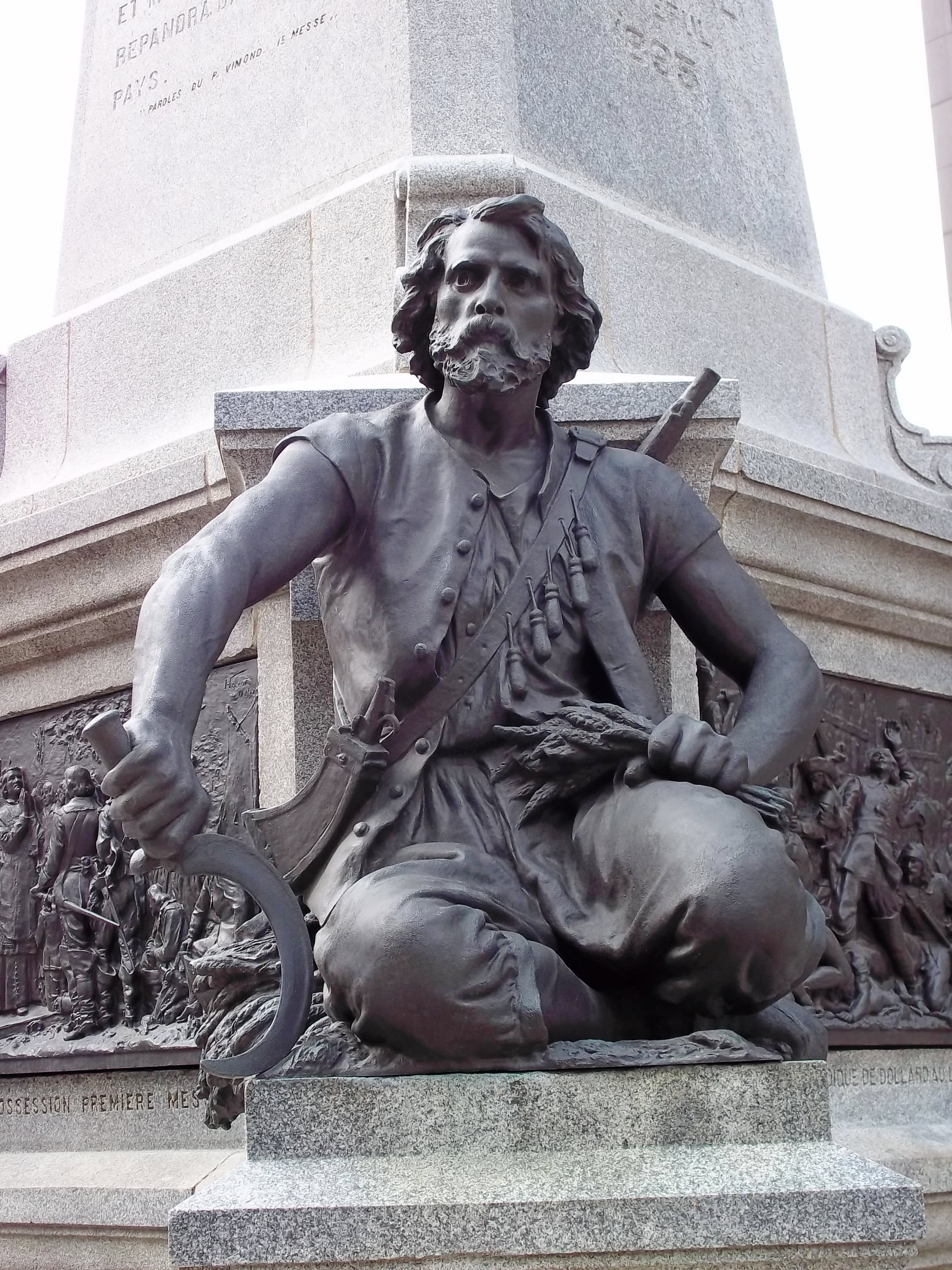 Charles Le Moyne au Monument à Maisonneuve, Place d'Armes, Montréal